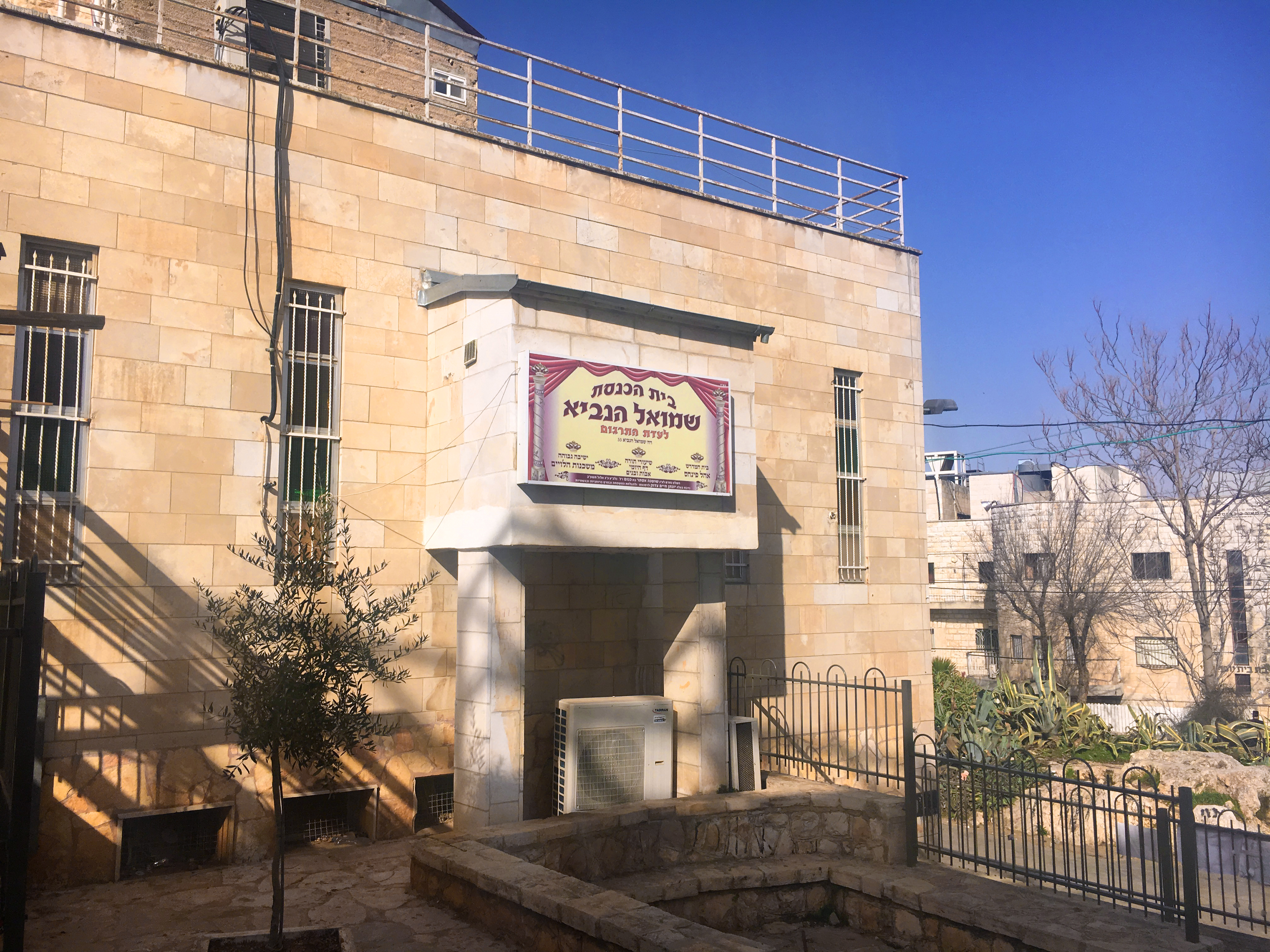 מבנה בית הכנסת לעדת התרגום במבט מבחוץ